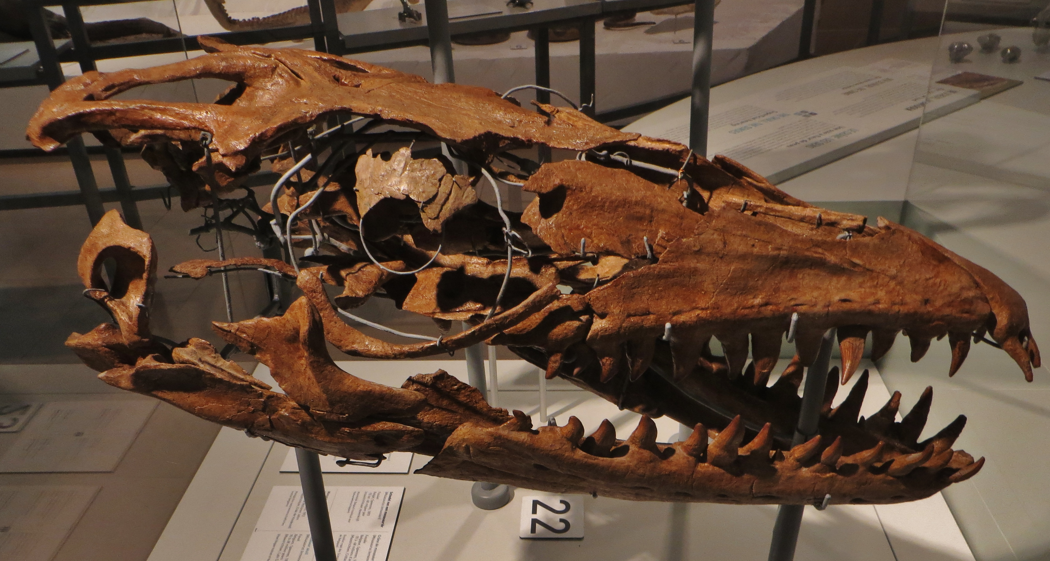 Fossil - Took The picture at Royal Belgian Institute of Natural Sciences, Brussels